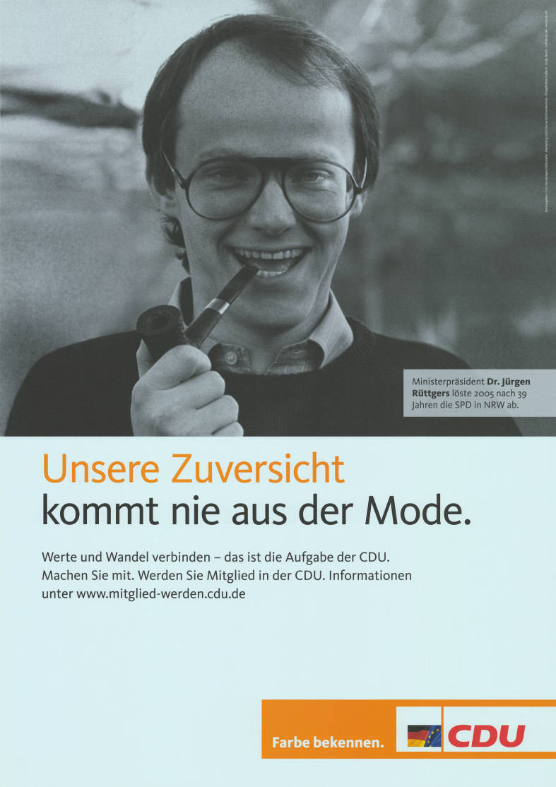 Ministerpräsident Dr. Jürgen Rüttgers löste 2005 nach 39 Jahren die SPD in NRW ab. Unsere Zuversicht kommt nie aus der Mode. Werte und Wandel verbinden - das ist die Aufgabe der CDU. Machen Sie mit. Werden Sie Mitglied in der CDU. Informationen unter Farbe bekennen. CDU Abbildung: Jugendfoto mit Pfeife Plakatart: Kandidaten-/Personenplakat mit Porträt Auftraggeber: CDU-Bundesgeschäftsstelle, Marketing und Interne Kommunikation, Berlin Objekt-Signatur: 10-031 : 60010 Bestand: CDU-Plakate ( 10-031) GliederungBestand10-18: CDU-Plakate (10-031) » Mitgliederwerbeaktion 2007 Lizenz: KAS/ACDP 10-031 : 60010 CC-BY-SA 3.0 DE